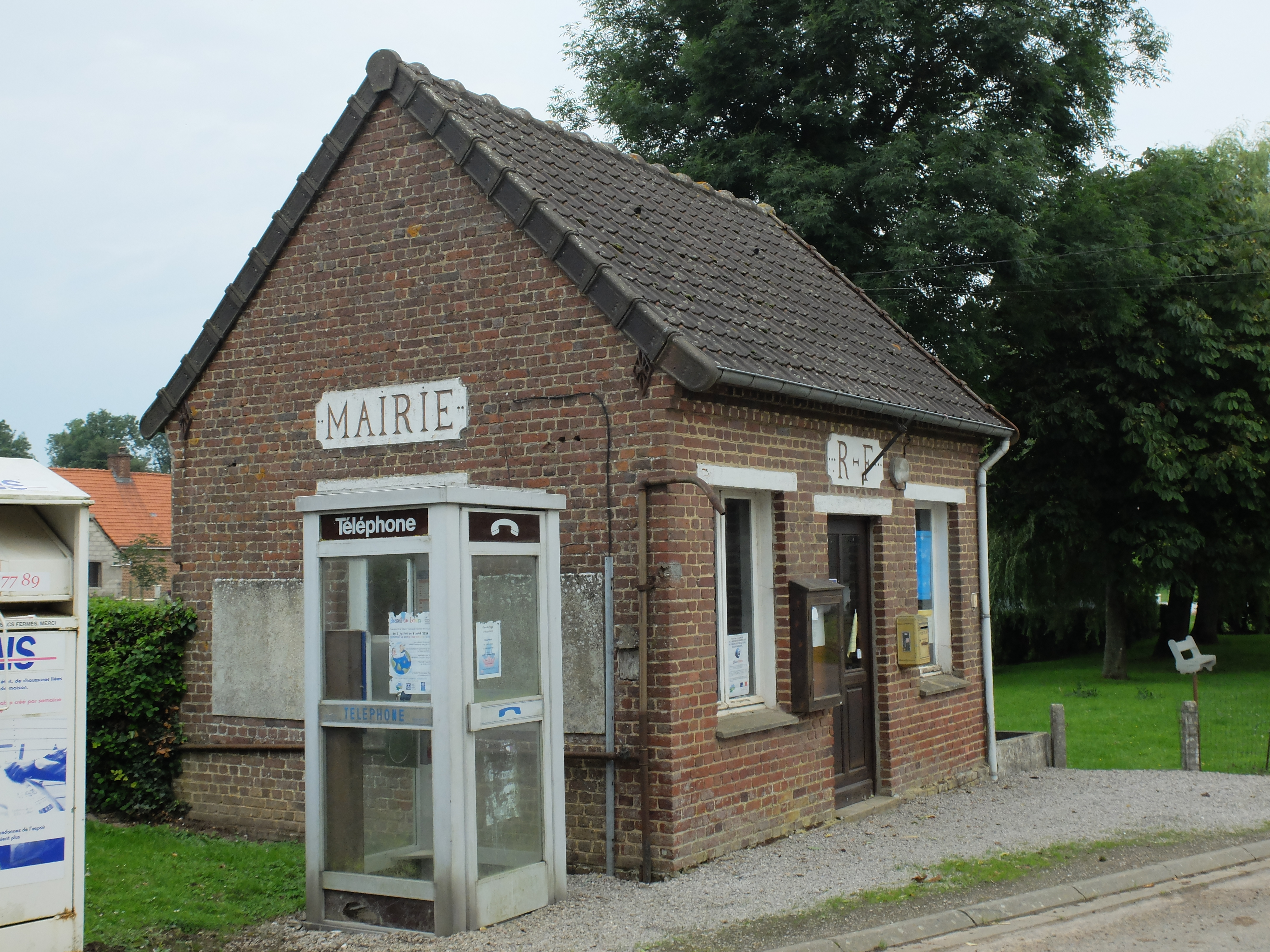 Vue de la mairie d'Avesnes.